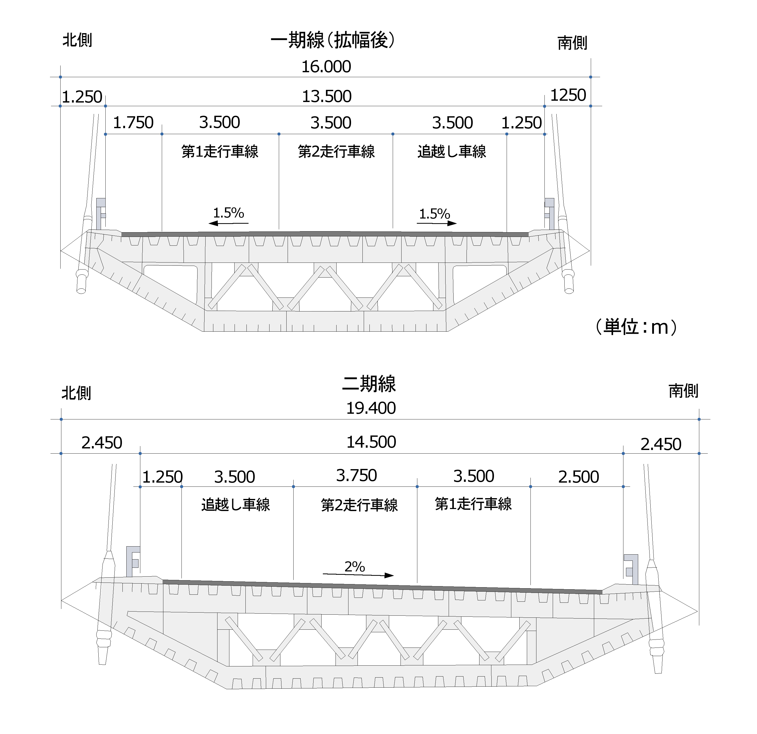 名港西大橋主桁比較図。一期線拡幅後と二期線の比較。典拠：『伊勢湾岸道路工事誌』日本道路公団名古屋建設局伊勢湾岸道路工事事務所、1998年3月、304頁、411頁